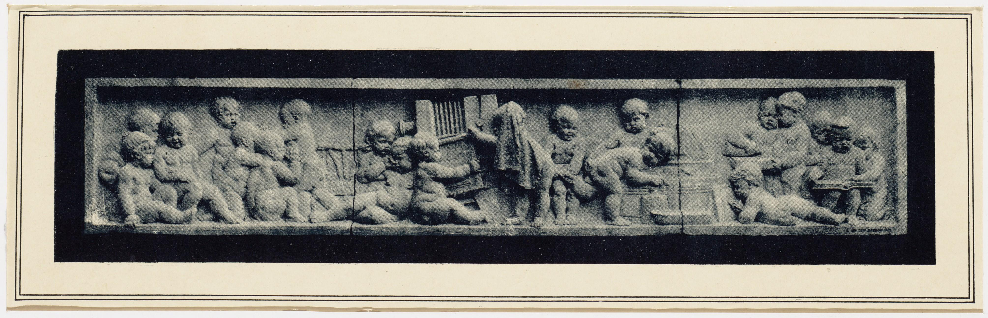 Beschrijving Fries met putti die met een platencamera spelen, in de gevel van het woonhuis en atelier van de fotograaf Albert Greiner Het fries was ontworpen en uitgevoerd door de beeldhouwers Van den Bossche en Crevels. Fotomechanische reproductie. Documenttype foto Vervaardiger Onbekend Anoniem Collectie Collectie Stadsarchief Amsterdam: foto-afdrukken Datering 1900 ca. Geografische naam Nieuwendijk Inventarissen Afbeeldingsbestand OSIM00005003176